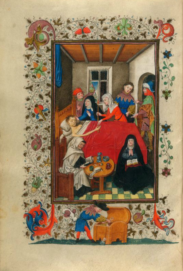 Getijden van Katharina van Kleef: Doodsbedscène Morgan Library M.917 p180